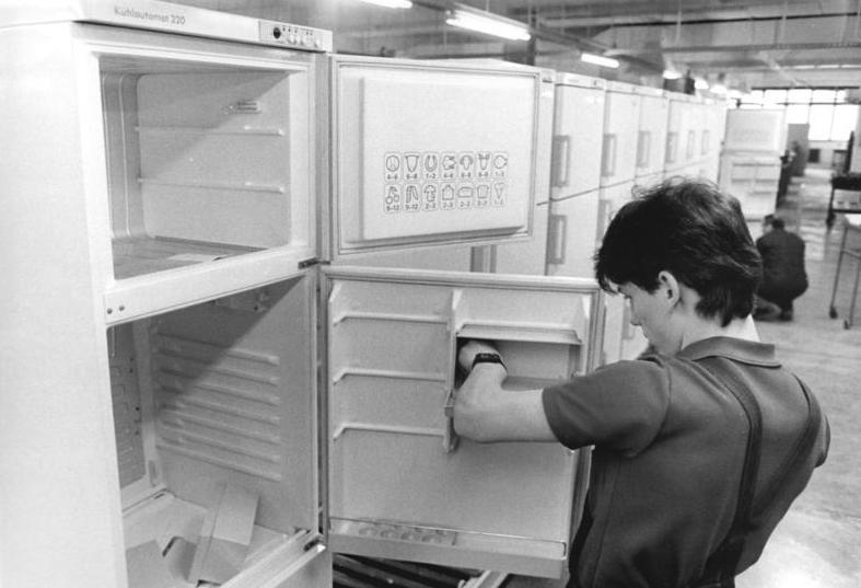 ADN-ZB-Grimm-25.3.1988-Berlin-Konsumgüter- Bei der Produktion des 3-Temperaturkühlschrankes "Kühlautomat 320" im VEB Kühlautomat Berlin soll die Arbeitsproduktivität gegenüber dem Vorjahr auf 300 Prozent gesteigert werden. Zur Herstellung des Kosumgutes wurden neue automatische Anlagen in Betrieb genommen. Zehn Industrieroboter arbeiten bereits. Monteur Marco Noack setzt Fächer in die Kühlschranktür ein.